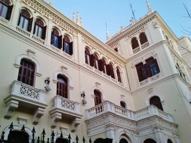 Palacio Müller, joya arquitectónica de Granada